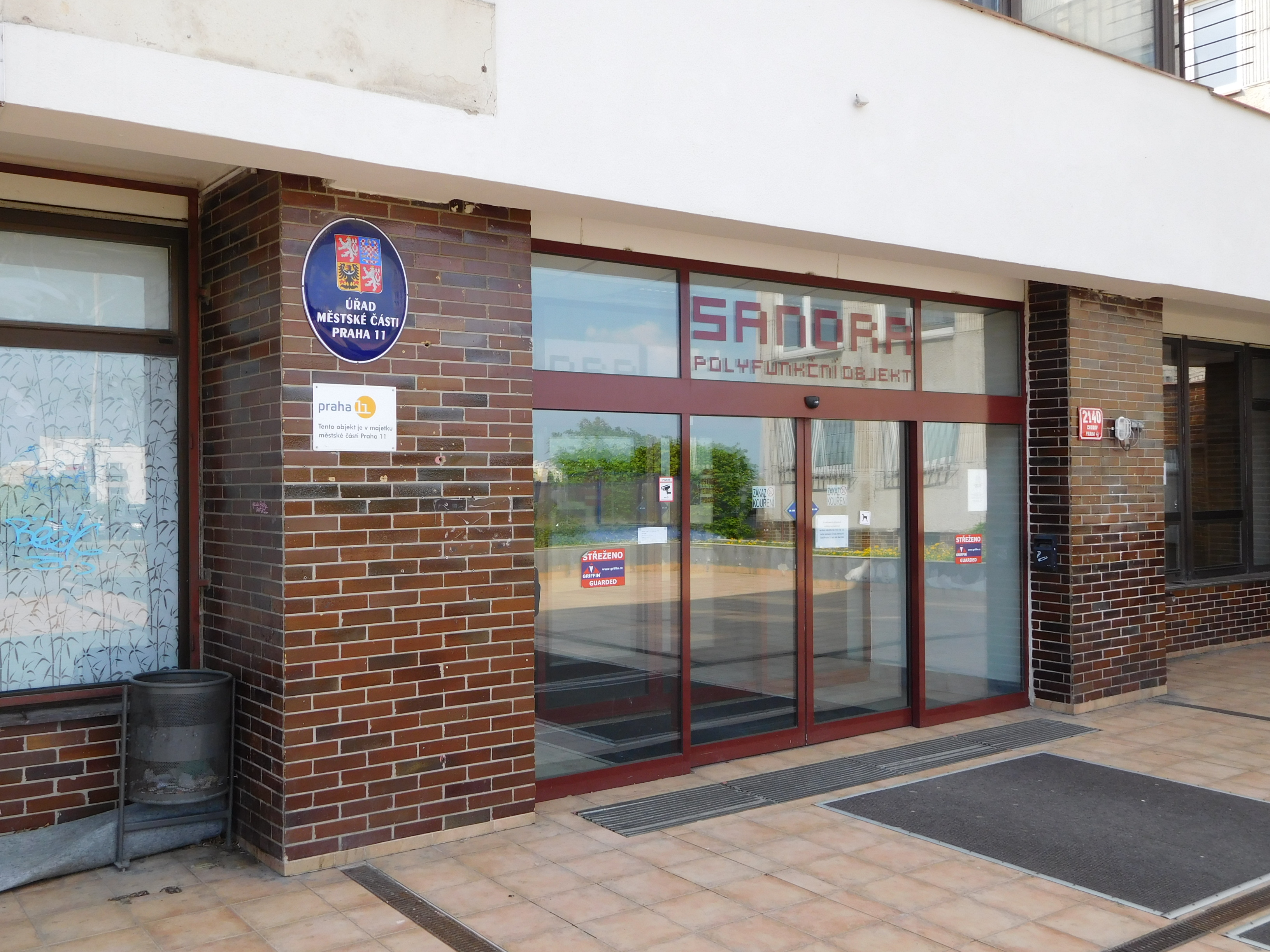 Praha - Chodov, Nad Opatovem 2, Polyfunkční objekt Sandra